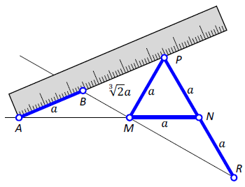 Удвоение куба с помощью невсиса. Длина отрезка BP соответствует стороне куба двойного объёма (кубический корень из 2)